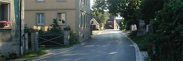 Abtsgreuth